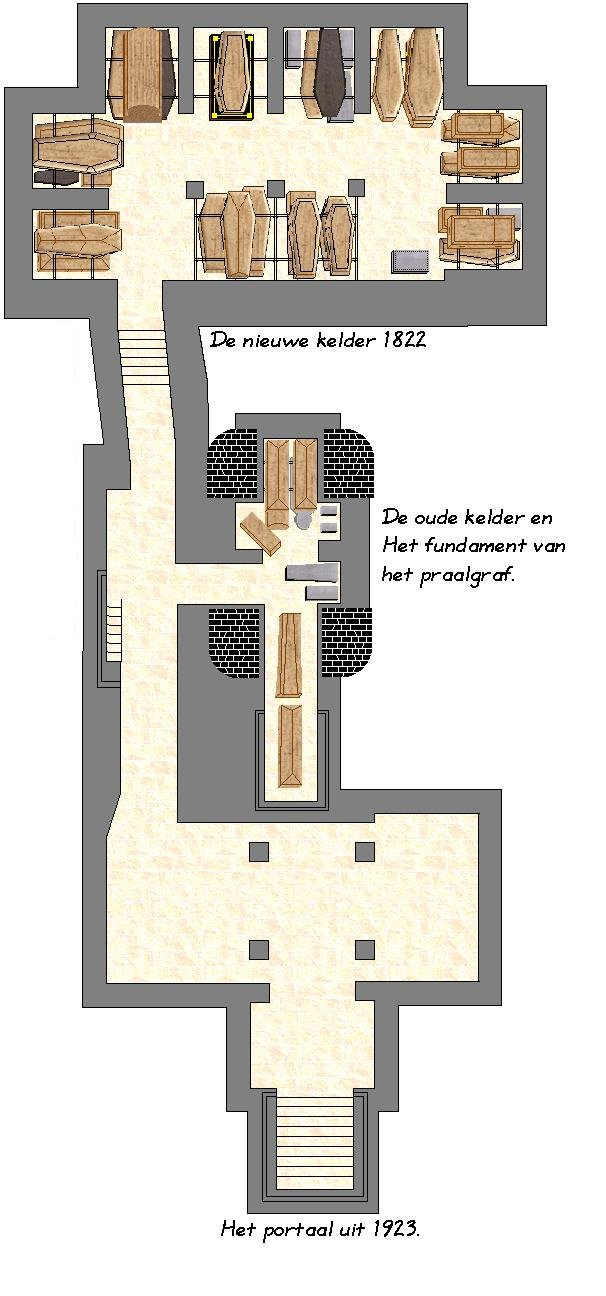 Een zelfgemaakte tekening. Deze plattegrond is op schaal getekend, alleen de nissen in de oude kelder zijn om technische redenen iets dieper getekend dan in werkelijkheid het geval is. Ik maak ook een tekening met de nummers bij de kisten. Omdat de koninklijke familie geen foto's van de kelder heeft laten maken en er weinig betrouwbare verslagen zijn heb ik de meeste kisten in één en dezelfde kleur hout uitgevoerd.Uit de literatuur weten we dat een aantal houten kisten in 1752 in lood zijn verpakt. In 1923 en 1945 zal het zelfde ook met nieuwere kisten zijn gedaan. Kort na de begrafenis in 1963 is ook Wilhelmina's kist in lood verpakt. De kleur van de kisten is dus giswerk. De vorm is wel redelijk bekend. De meesten zijn van een gangbaar model, de kisten van Louise de Coligny, Koning Willem I en Anna Pauwlona zijn van een merkwaardig model. Dit is op de tekening terug te vinden. Bronnen zijn de tekening in de Nieuwe Kerk in Delft, de tekening van Victor de Stuers uit 1890 en een Franse publicatie, de tekening van M.de Haenen uit "L'illustration" en " Het Leven", uit 1890. Ook diverse andere , hierop gebaseerde tekeningen zijn gebruikt. Robert Prummel